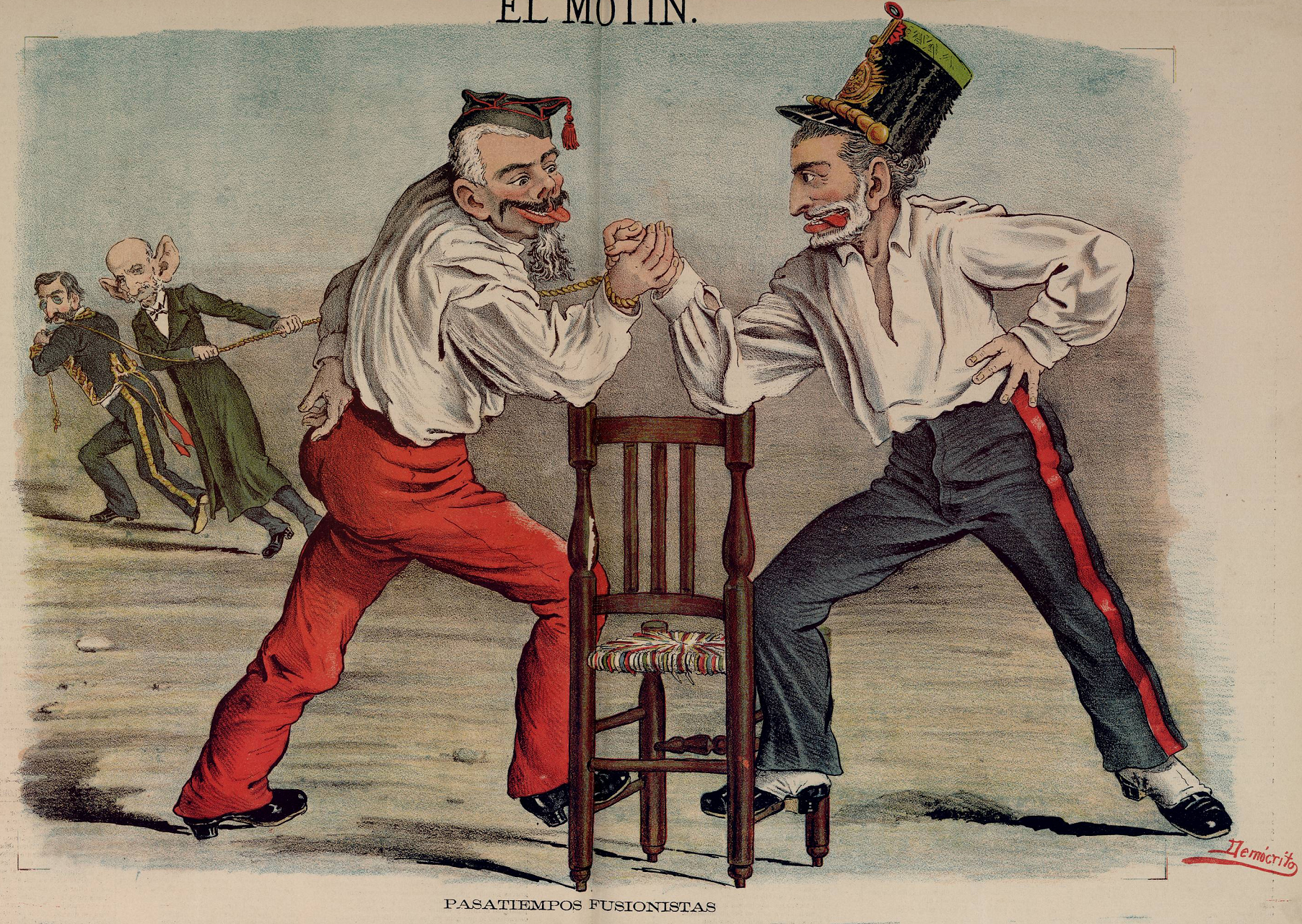 Pasatiempos fusionistas, de Eduardo Sojo «Demócrito, publicada en la revista satírica española El Motín.